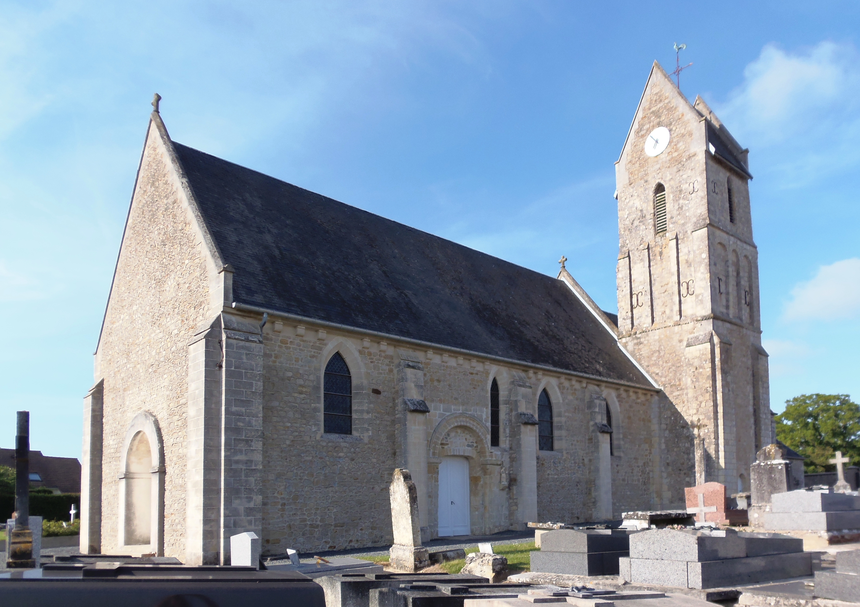 Hottot-les-Bagues (Normandie, France). L'église Notre-Dame.